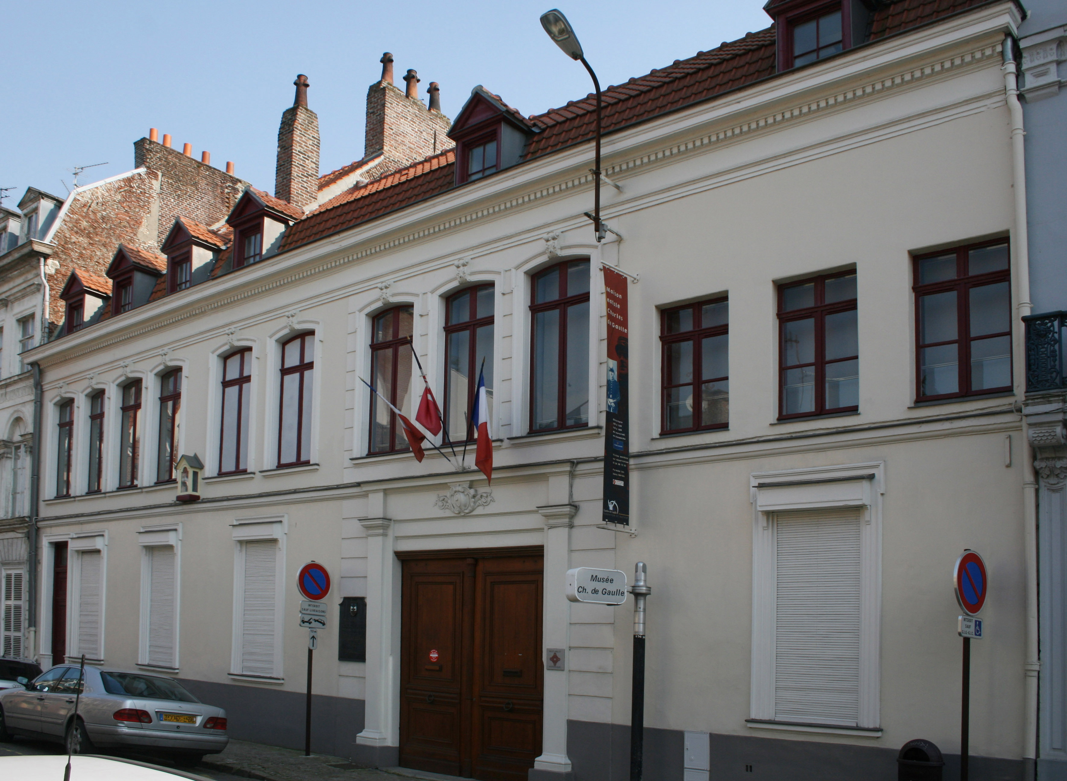 Geburtshaus von Charles de Gaulle in Lille, Frankreich